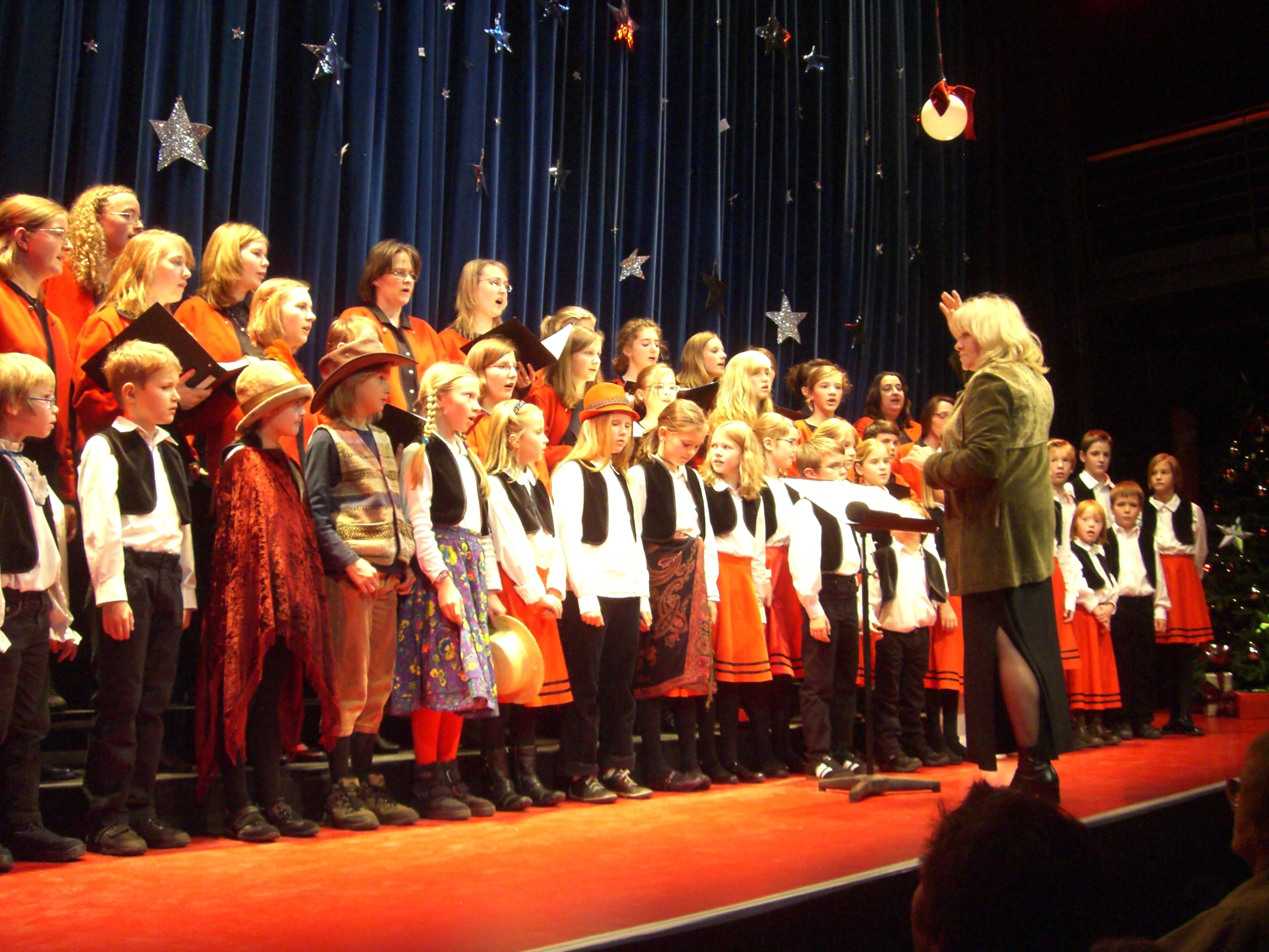 Jugendchor Belcanto unter Leitung von Margit Cherkeh beim Adventssingen am 6.12.2009 im Kleinen Haus des Staatstheaters Braunschweig